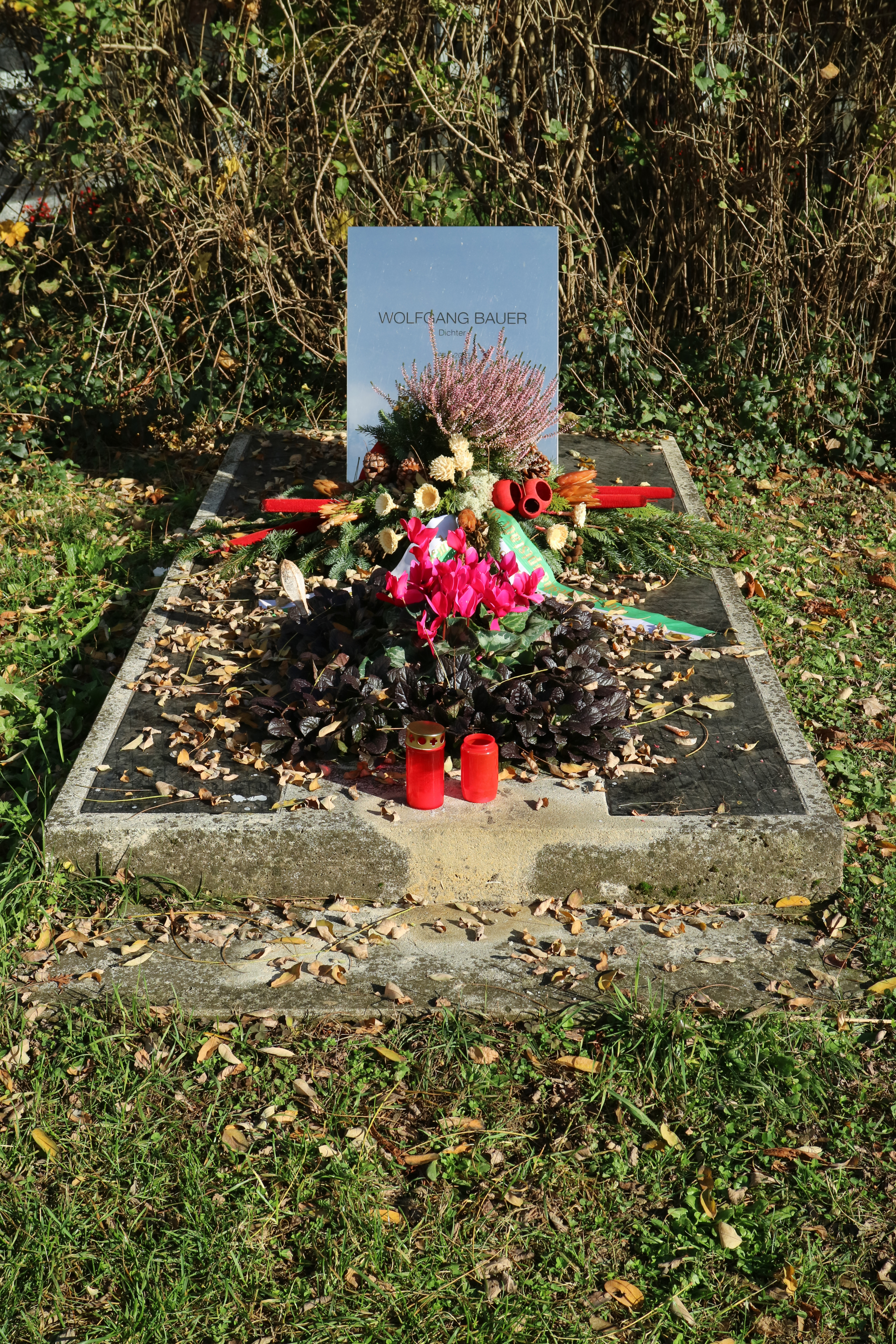 Grab des Schriftstellers Wolfgang Bauer (1941–2005) am Zentralfriedhof Graz